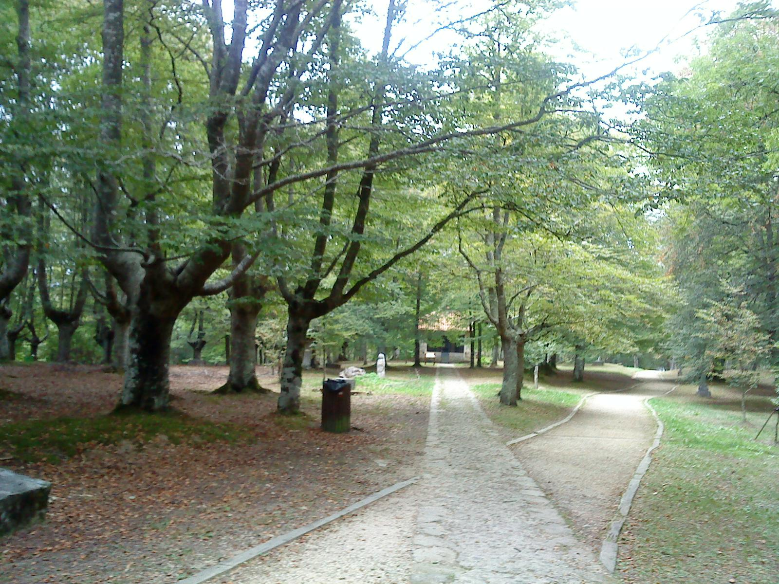 Paseo en el parque Natural de Urkiola en Bizkaia, País Vasco (España). Al fondo la ermita del Santo Cristo.